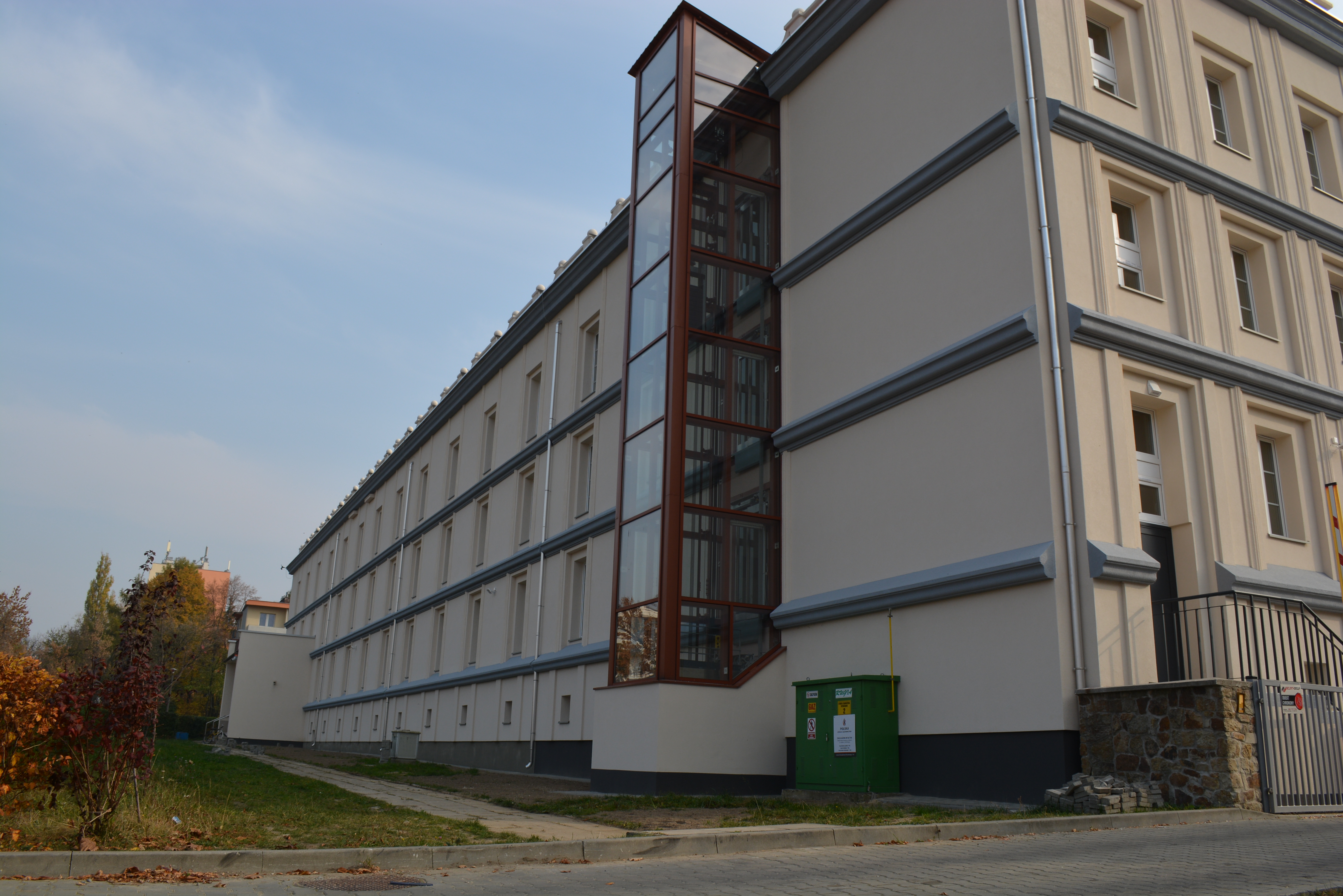 budynek Wydziału Pedagogiki i Psychologii